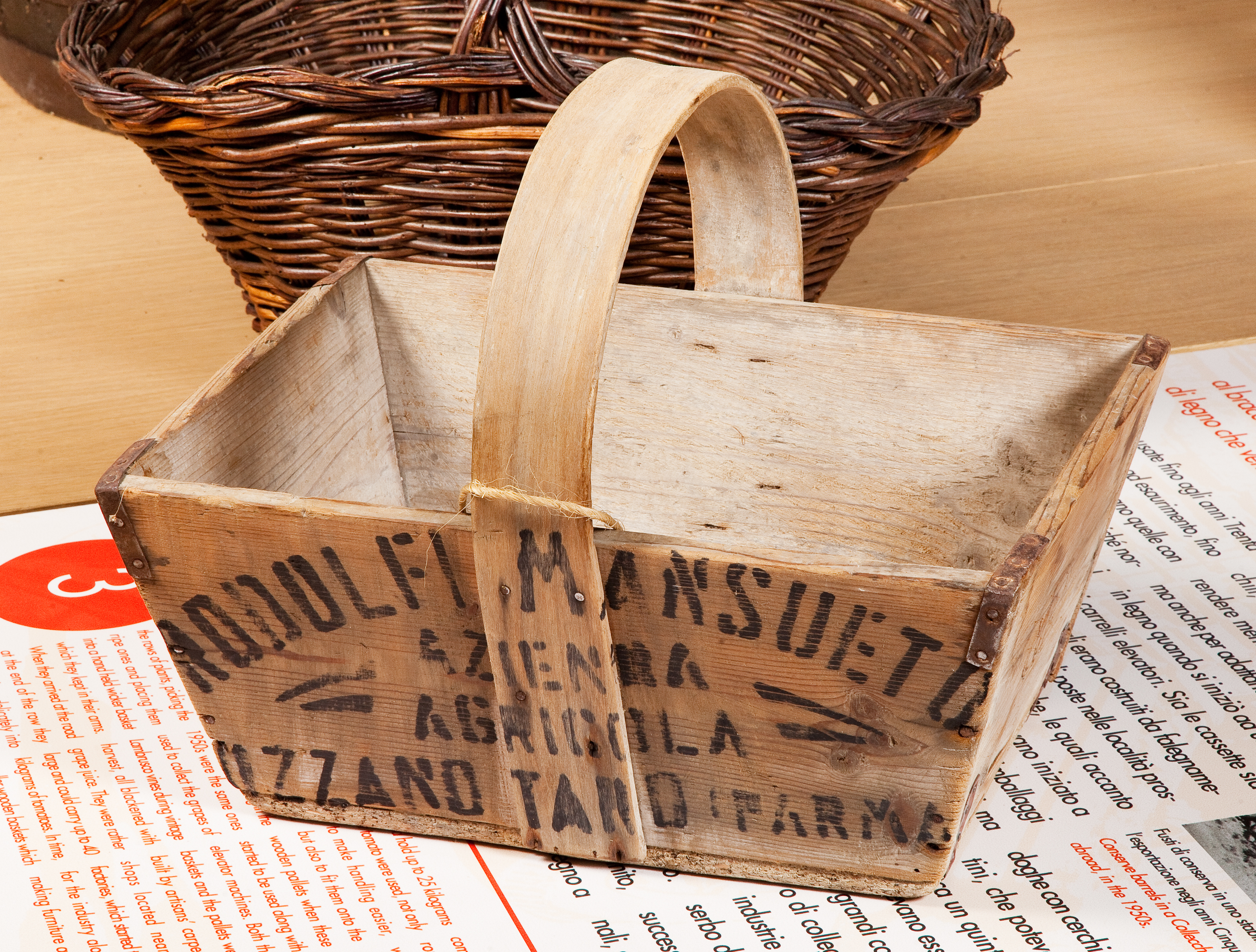 Recipiente in legno di forma rettangolare svasata, con un manico ad arco (in dialetto: minéla). Su uno dei lati lunghi compare la scritta a stampo a lettere capitali ‘RODOLFI MANSUETO AZIENDA AGRICOLA OZZANO TARO (PARMA)’ e in un lato corto un piccolo ovale pirografato includente le lettere iniziali M, R, O intrecciate.